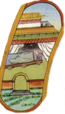 Eine Verbildlichung des zehnten Gliedes der bedingten Enstehung. Ausschnitt dem tibetischen Das "Rad des Lebens" Bhâva-Chakra, einem tibetischen Rollbilder, "Thangka". Dieses berühmte tibetische Symbol resümiert den ganzen Buddhismus. Es ist ein Hauptmotiv für die tibetischen Rollbilder "Thangkas", welche dem Zweck der meditativen Veranschaulichung bzw. befreienden Einsicht dienen.